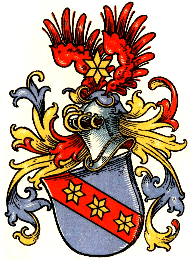 Wappen derer von Ploennies